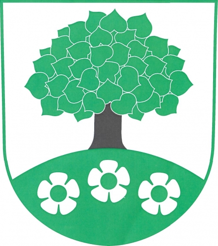 znak, Vysoké, okres Žďár nad Sázavou